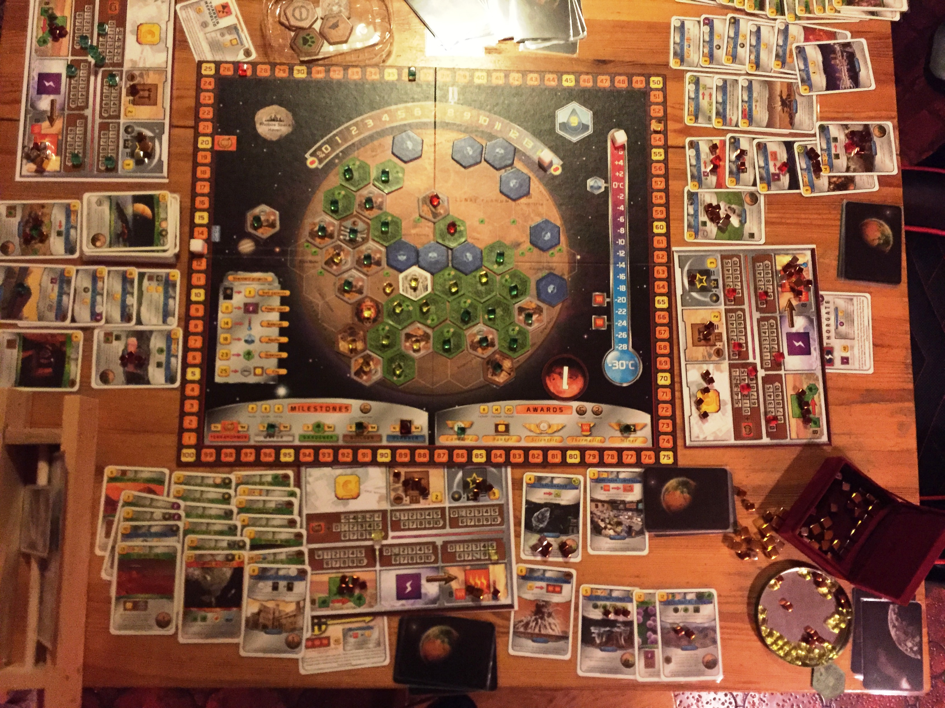 Terraforming Mars grundspel på tre spelare. Visar spelplan, spelarbräden och spelarnas kort vid slutet av en spelomgång